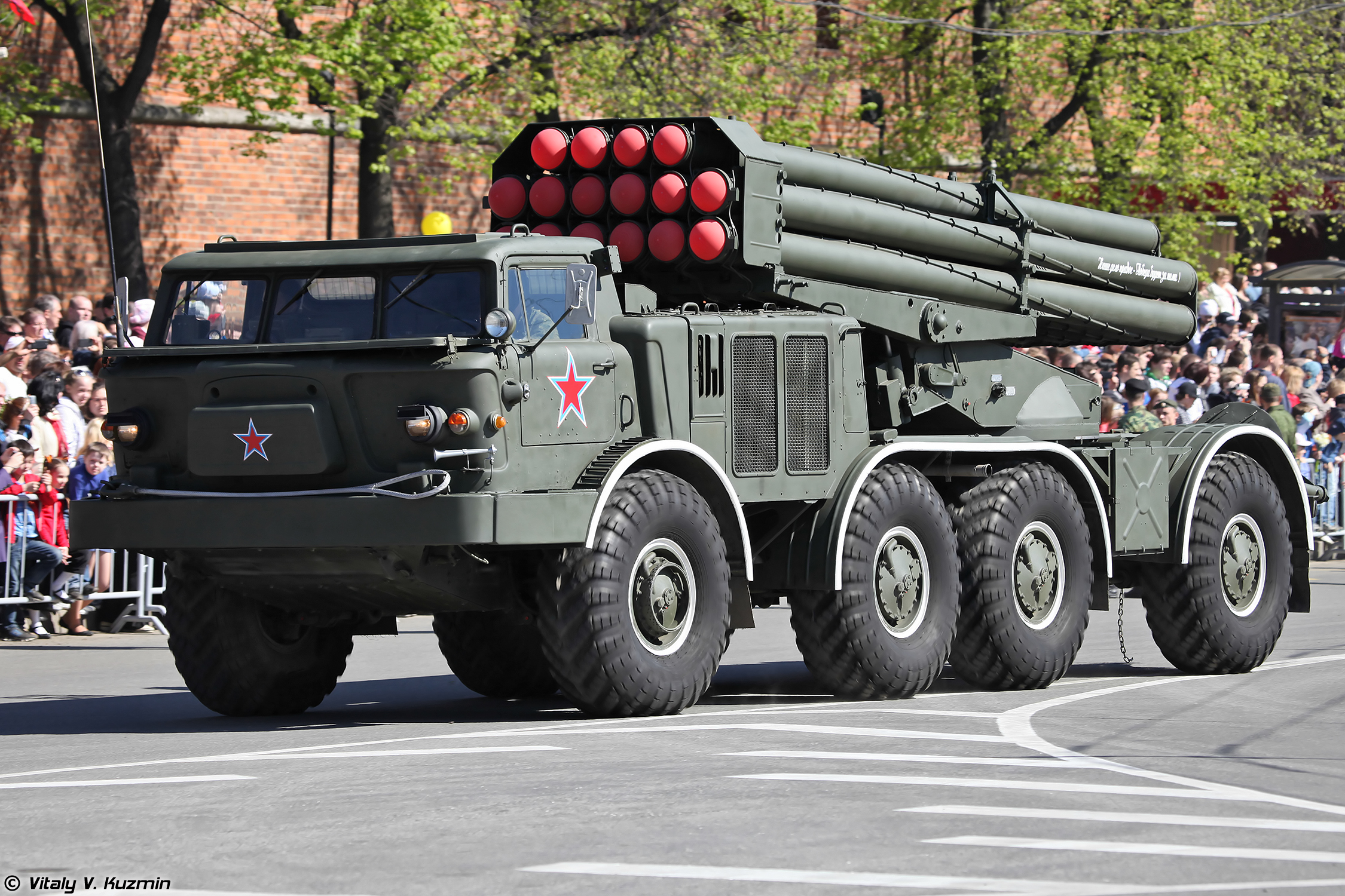 БМ-27 Ураган (BM-27 Uragan MLRS)